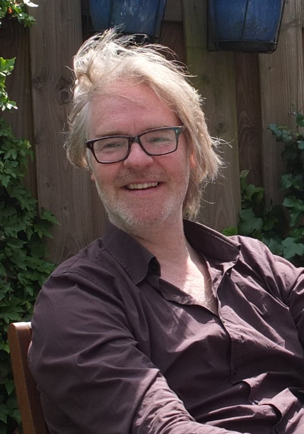 Kees de Boer, Nederlands illustrator